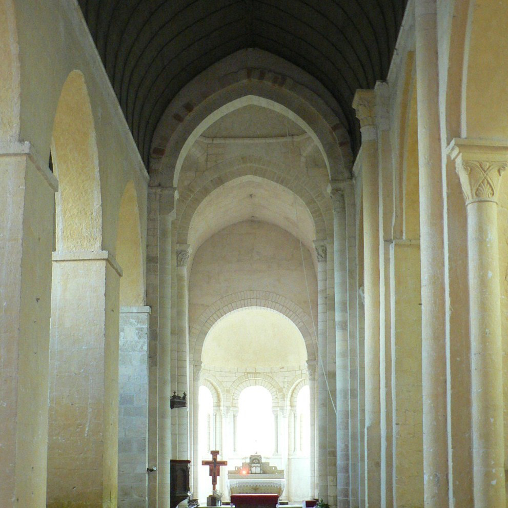 Église Saint-Martin de Plaimpied